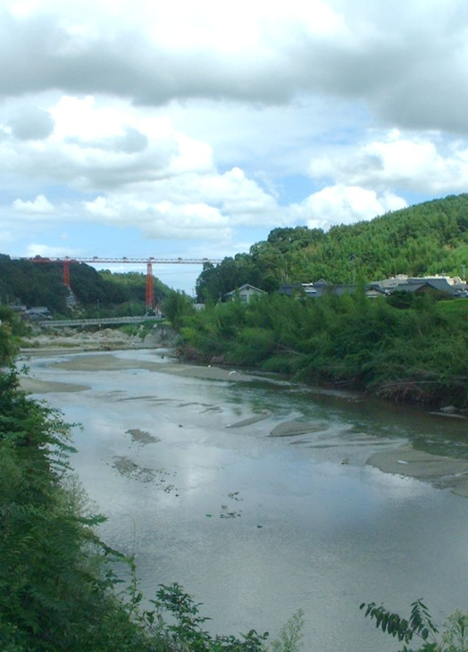 香東川 香川県高松市香川町・塩江町（撮影当時は香川郡ja:香川町・塩江町） 鮎滝交差点付近から下流方を望む